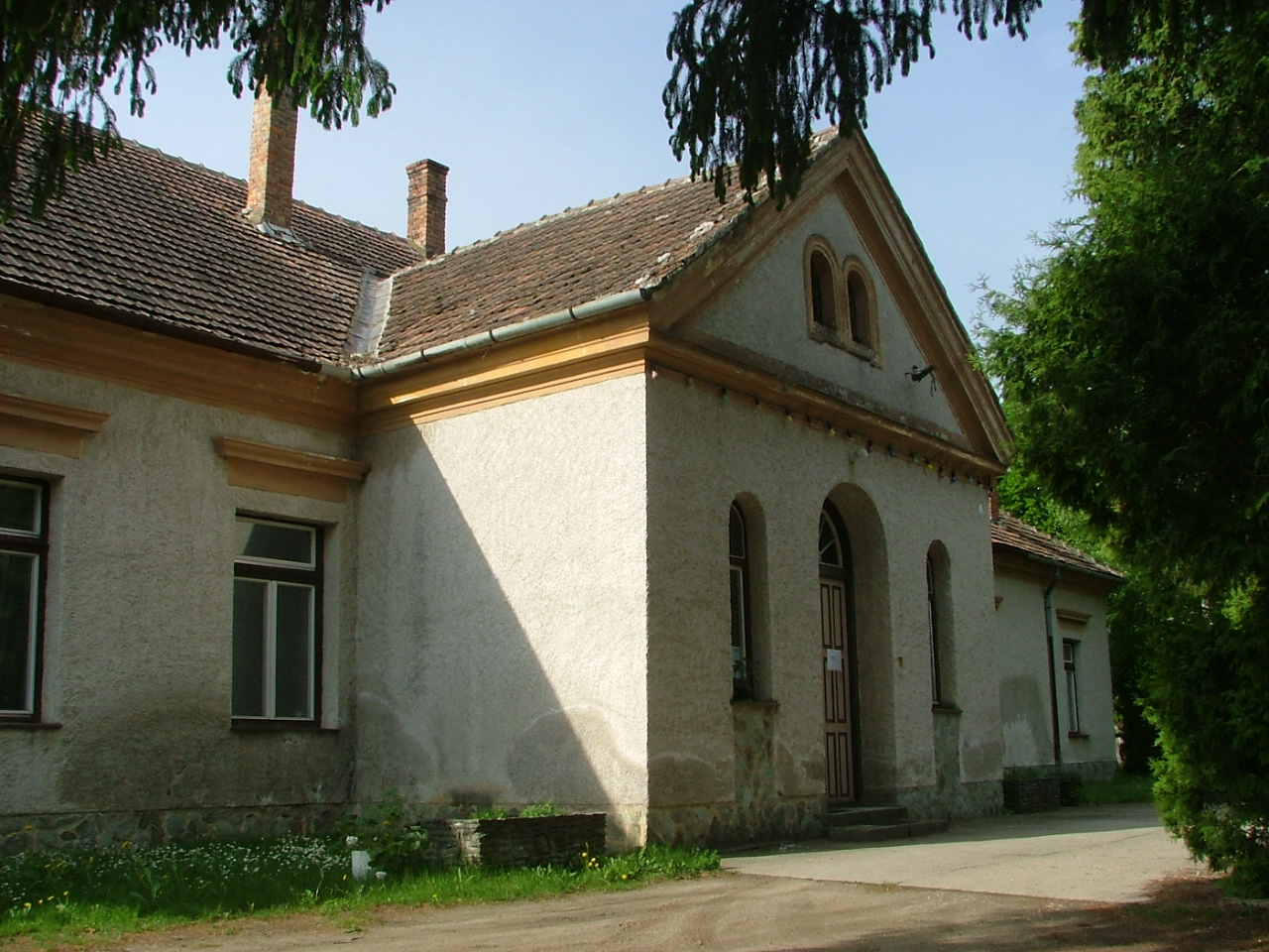 Schloß Simon im Chernelházadamonya